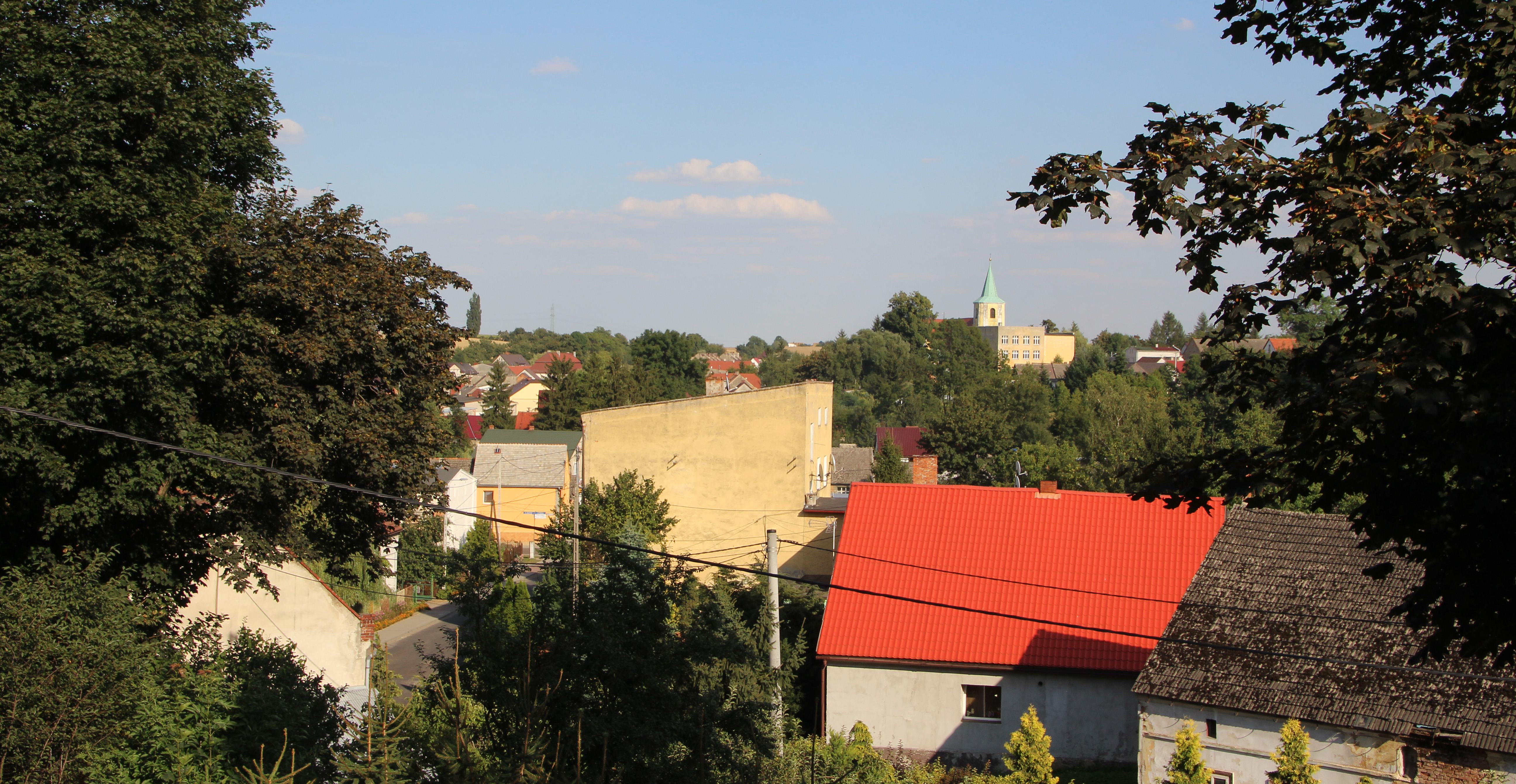 Ścinawa Mała – wieś w Polsce położona w województwie opolskim, w powiecie nyskim, w gminie Korfantów.